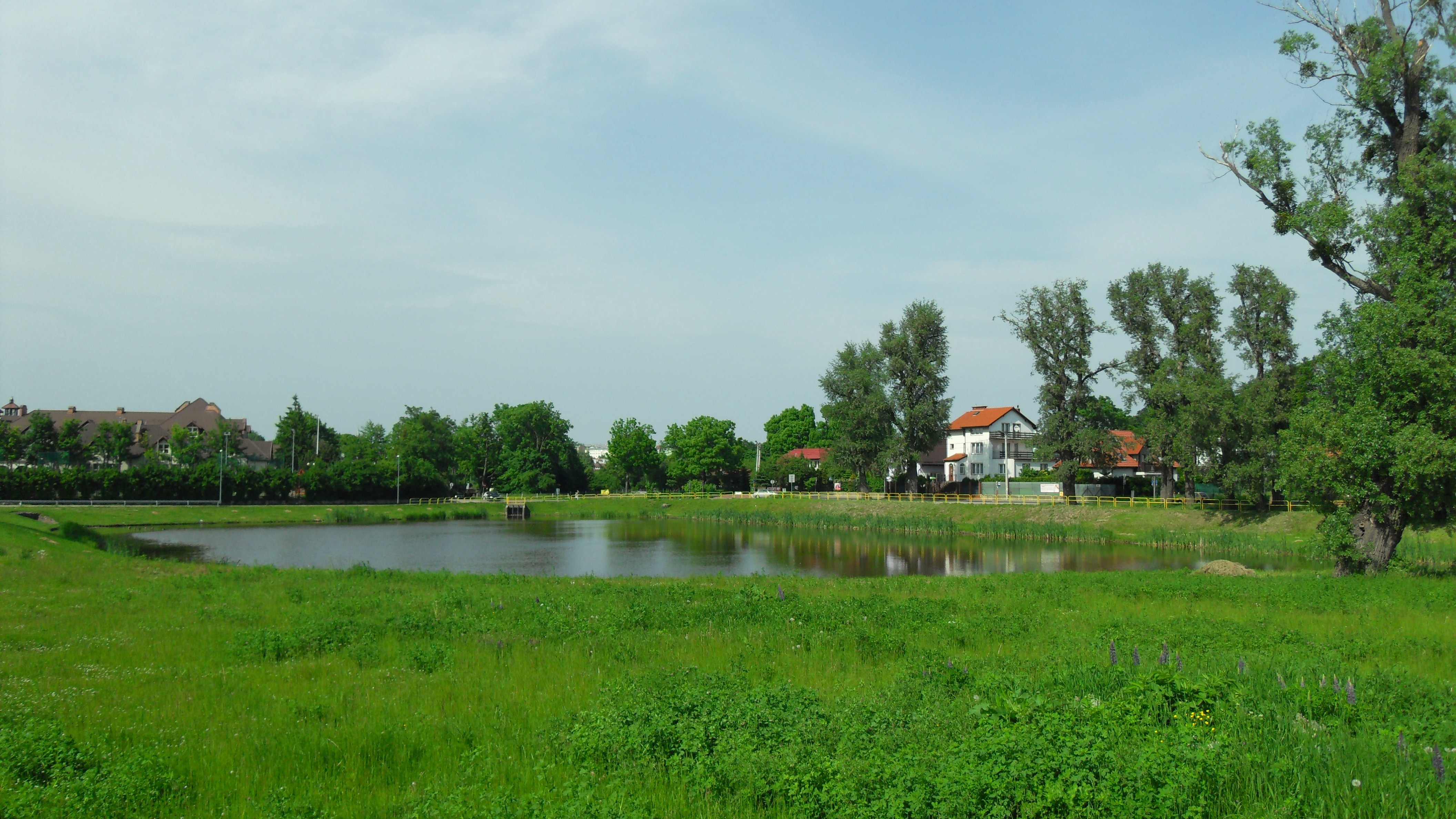 Gdańsk stare Łostowice, zbiornik retencyjny "Wielkopolska" przy ul. Wielkopolskiej.